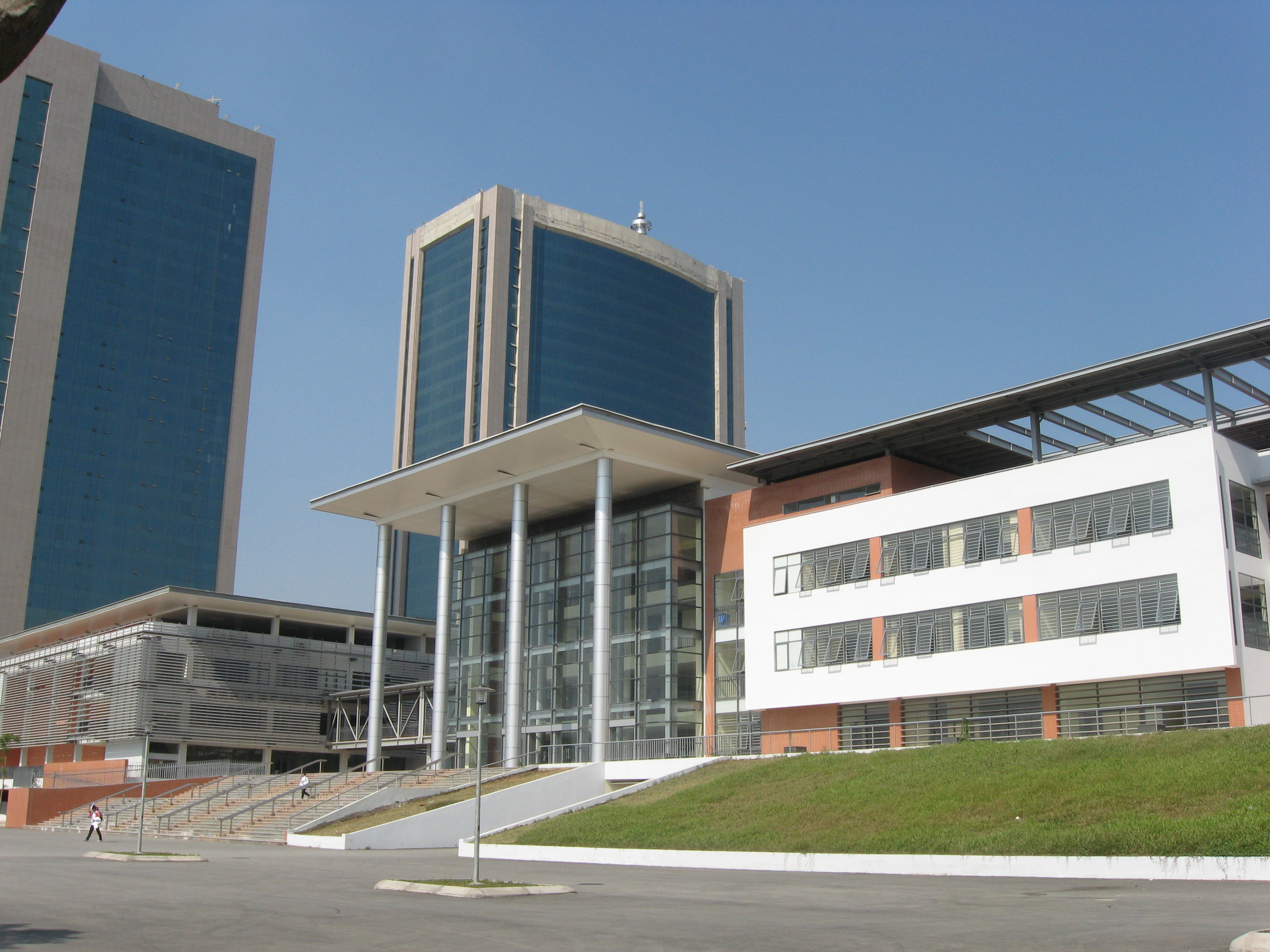 Hanoi – Amsterdam High School